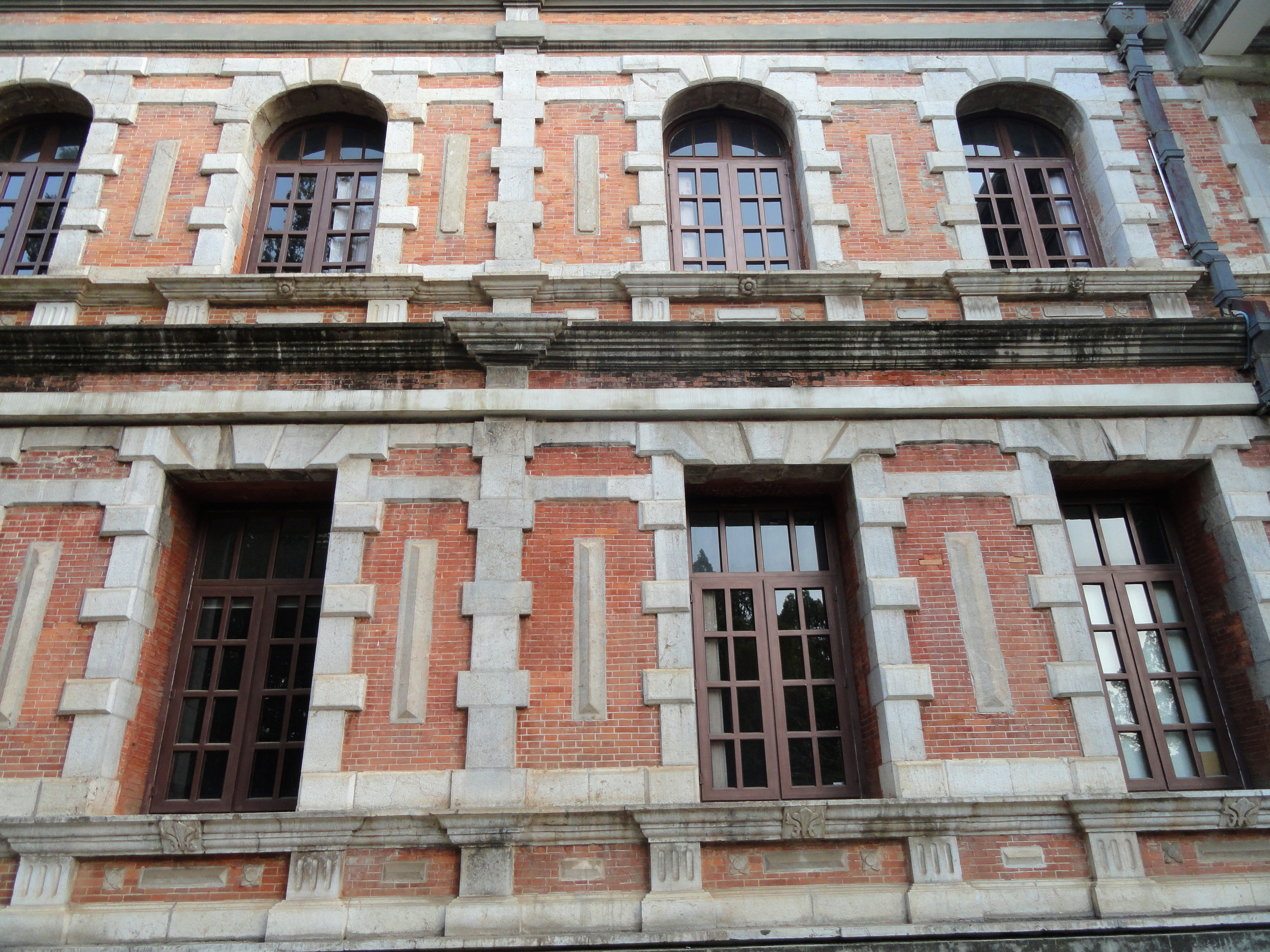 Yunnan University, Kunming, Yunnan, China.